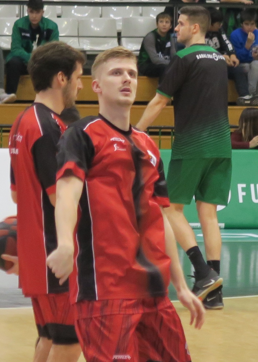 Luka Rupnik, jugador del Montakit Fuenlabrada, en un partit de lliga a l'Olímpic de Badalona davant el Divina Seguros Joventut.